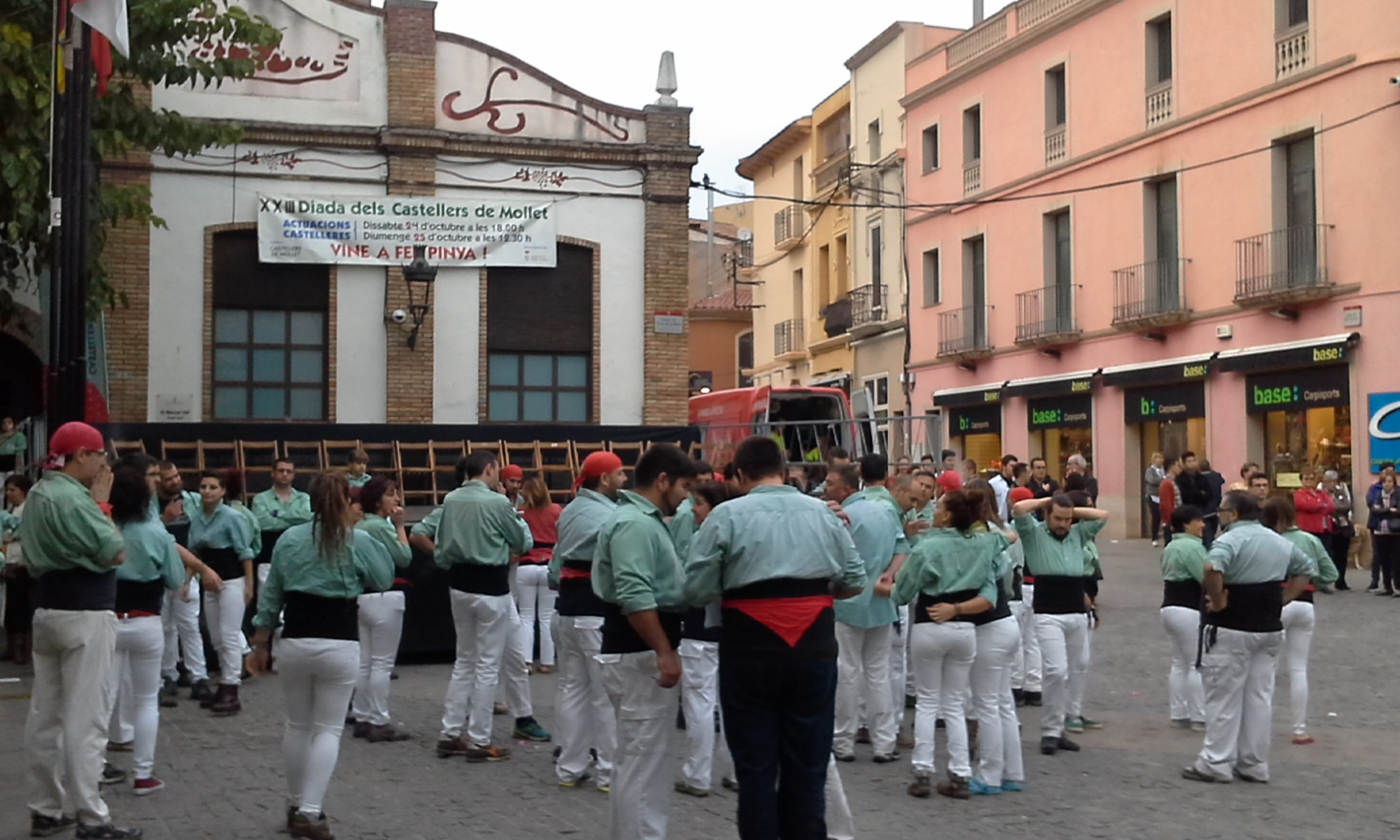 Mollet del Vallès: XXIII Diada dels Castellers de Mollet a la plaça Prat de la Riba.